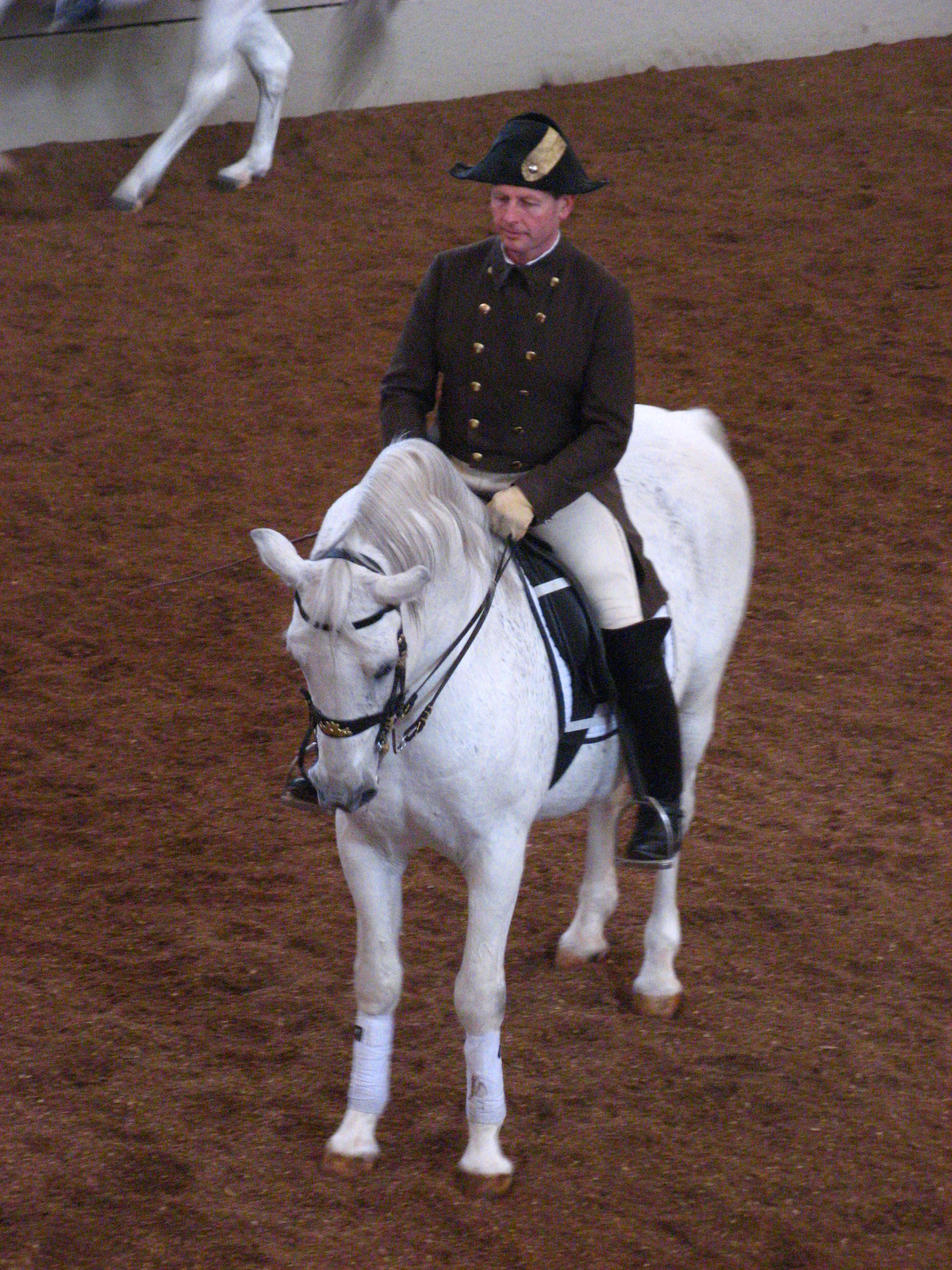 Vienna